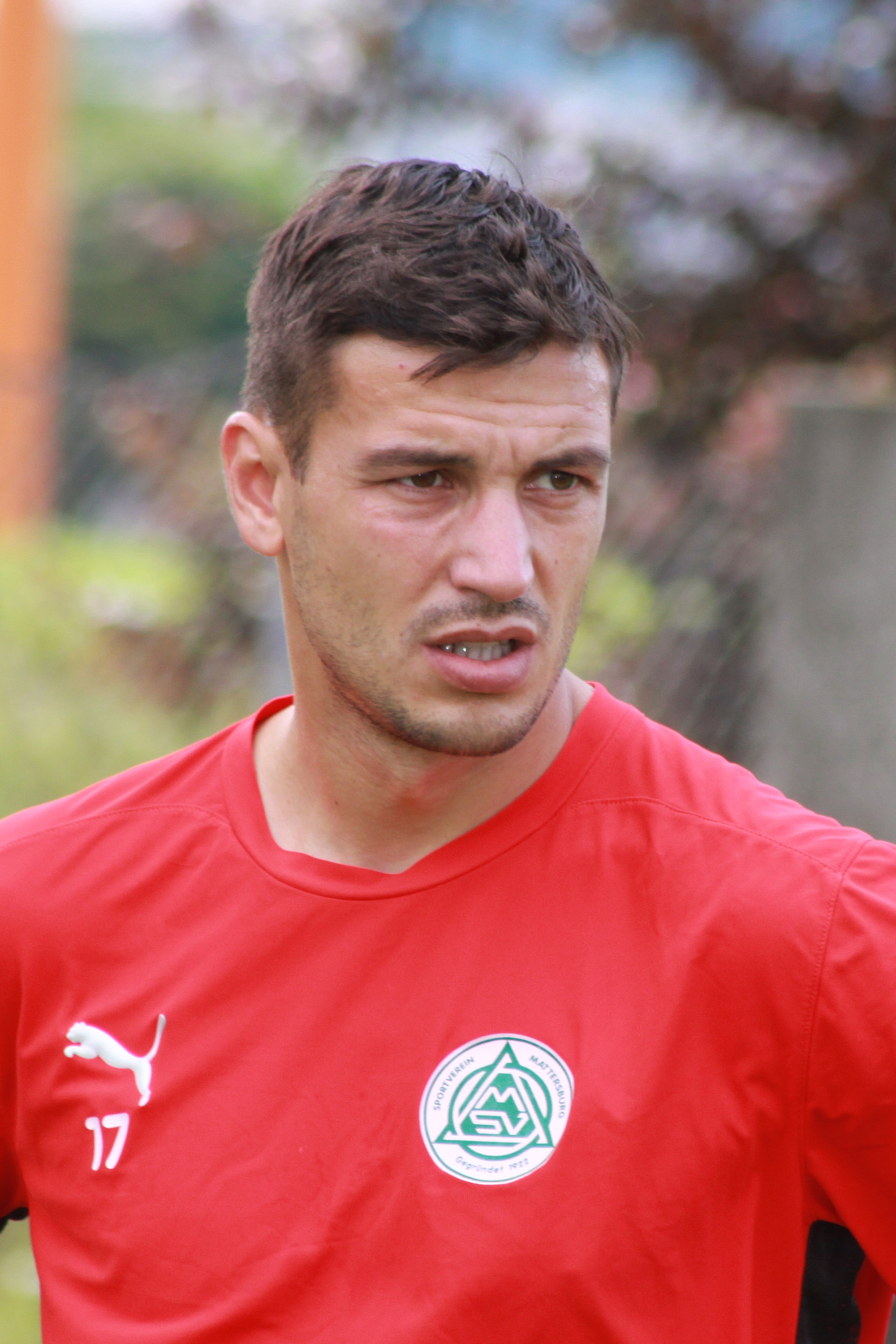 Robert Waltner - SV Mattersburg (1)